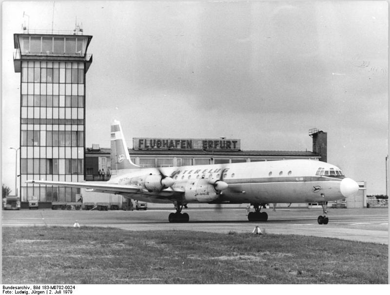 Erfurt, Flughafen, Tower, Flugzeug ADN-ZB Ludwig-2.7.79 Erfurt: Flugplatz der Bezirksstadt wurde nach umfangreichen Rekonstruktionarbeiten an der Start- und Landebahen sowie im Abfertigungsbereich wieder eröffnet. Die erste Maschine, die den Flughafen verließ, hatte Budapest zum Ziel. (Siehe auch M0702-25 N)